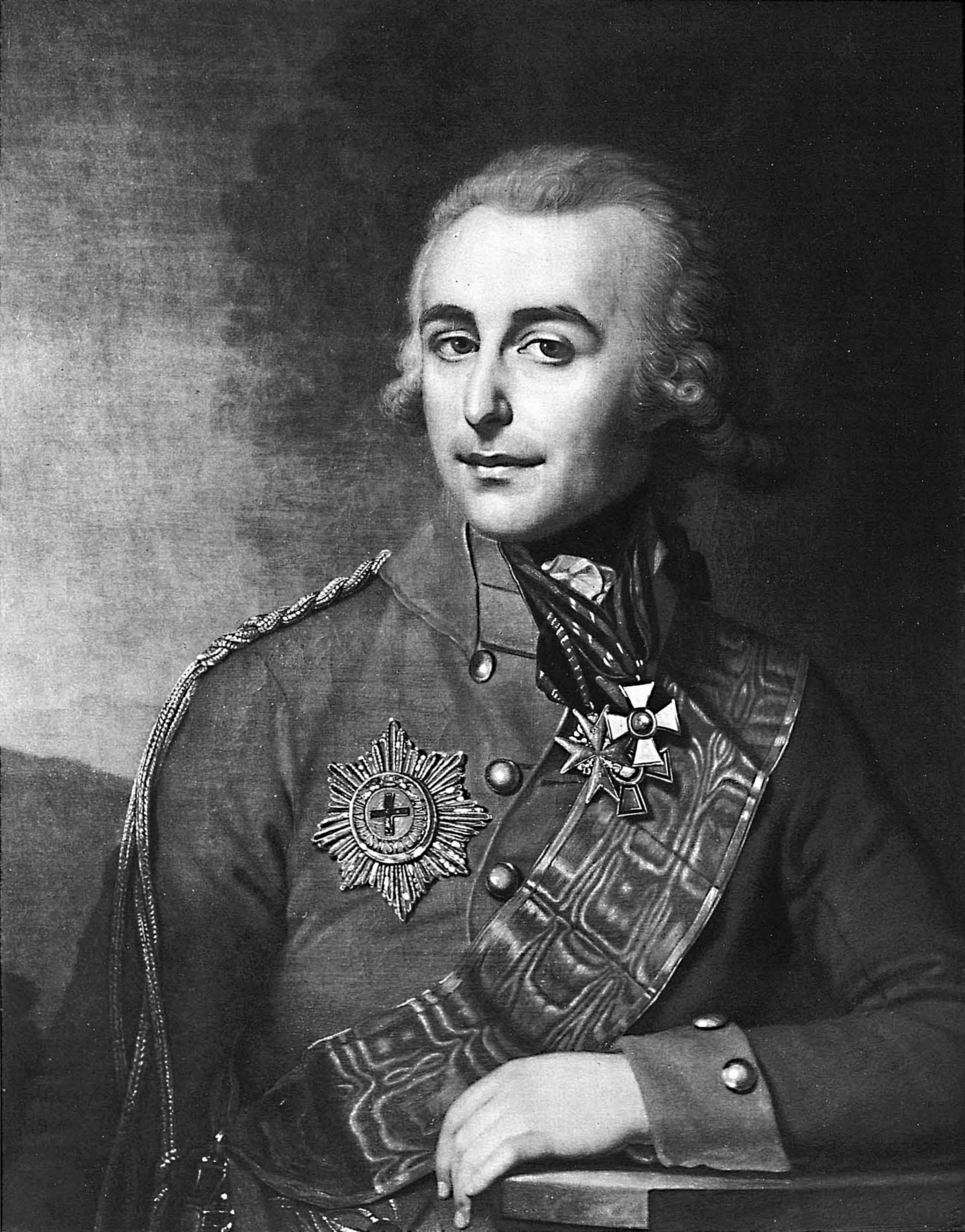 Граф Пётр Александрович Толстой (1769-1844)